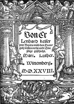 Buchumschlag von Martins Luthers Schrift „Von Ern Lenhard Keiser ynn Bayern um des Evangelii willen verbrannt“.